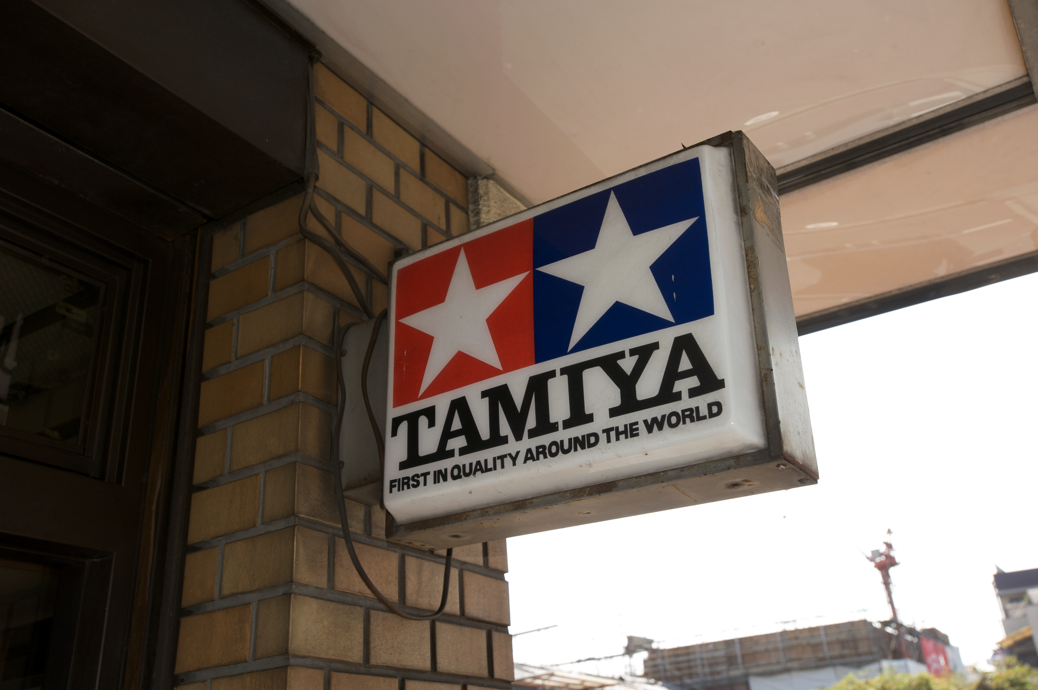 Tamiya